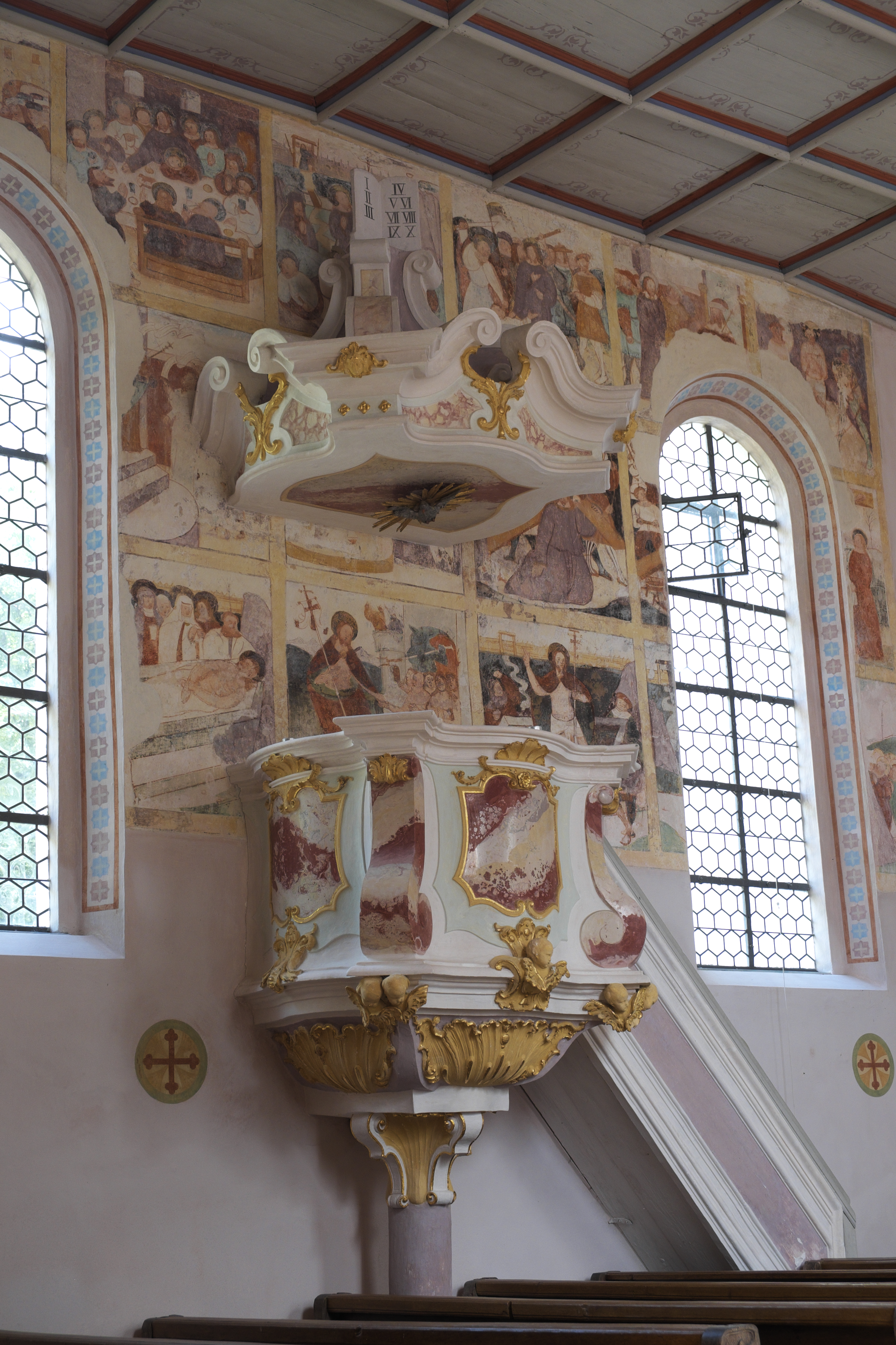 Katholische Filialkirche St. Michael, heute Friedhofskirche, in Waalhaupten (Waal) im Landkreis Ostallgäu (Bayern/Deutschland), Stuckmarmorkanzel, spätes 18. Jahrhundert